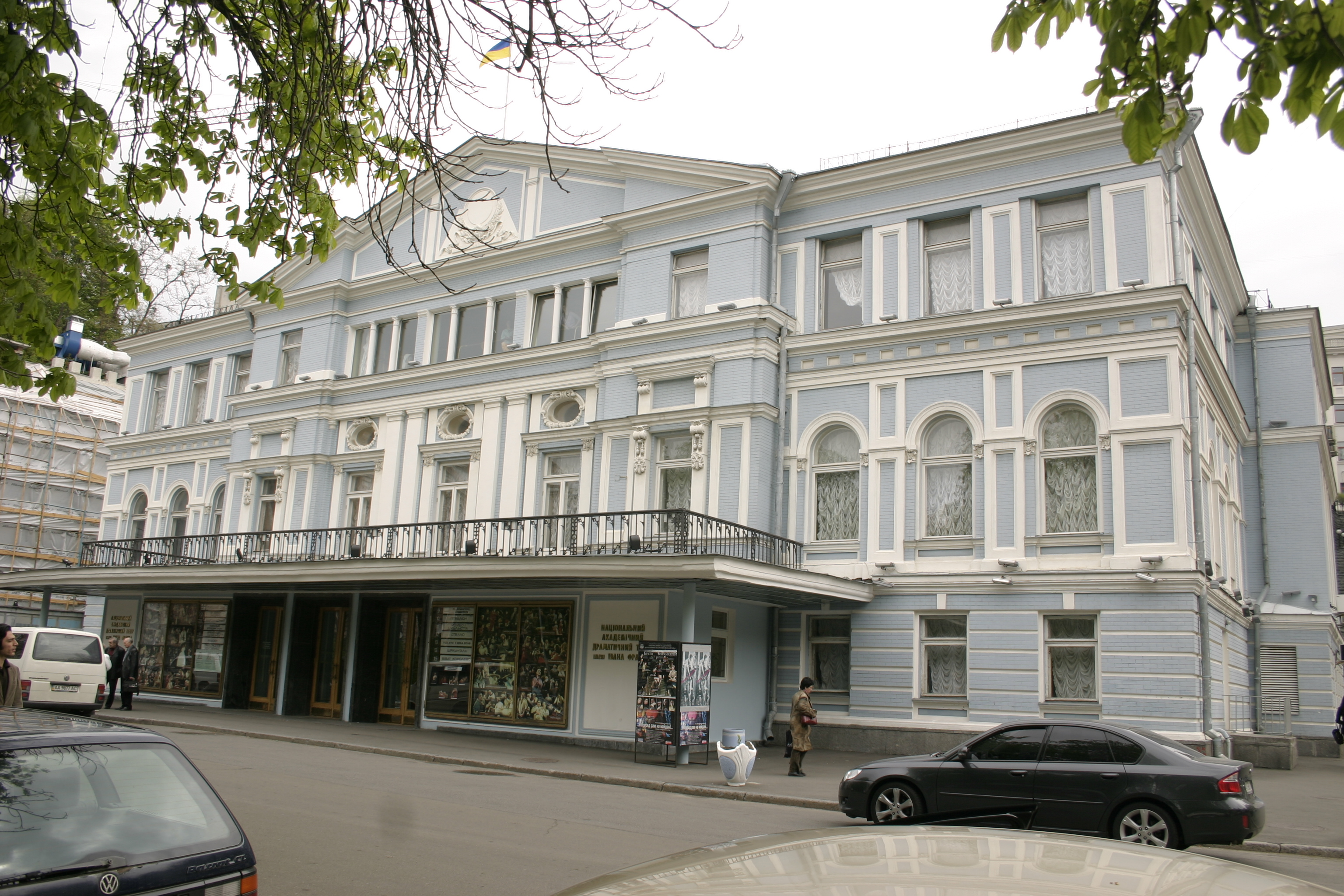 Фасад